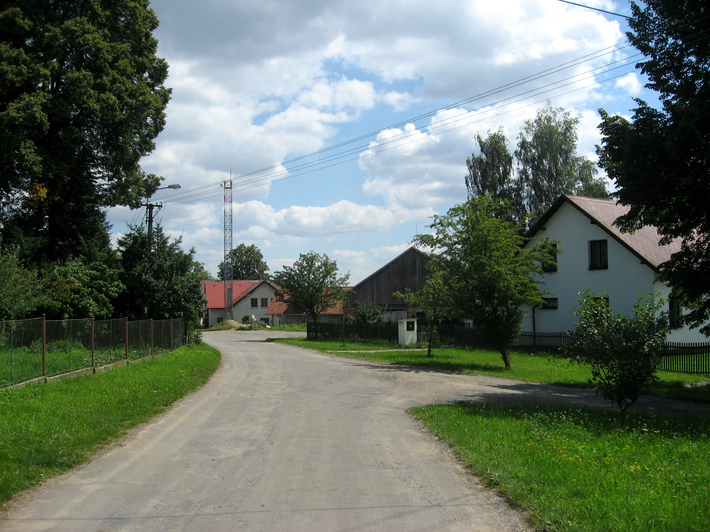 Květnov